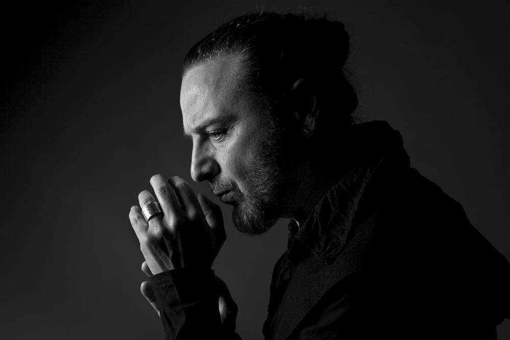 André Hübner-Ochodlo (1963– ) reżyser teatralny i pieśniarz